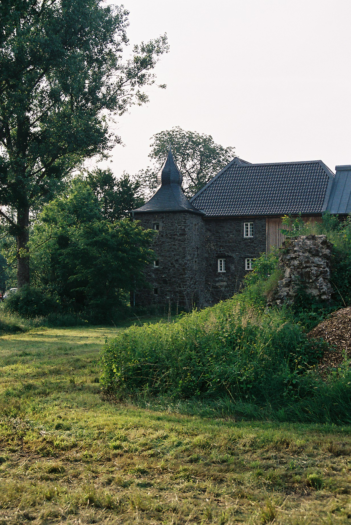 Haus Sülz in Lohmar